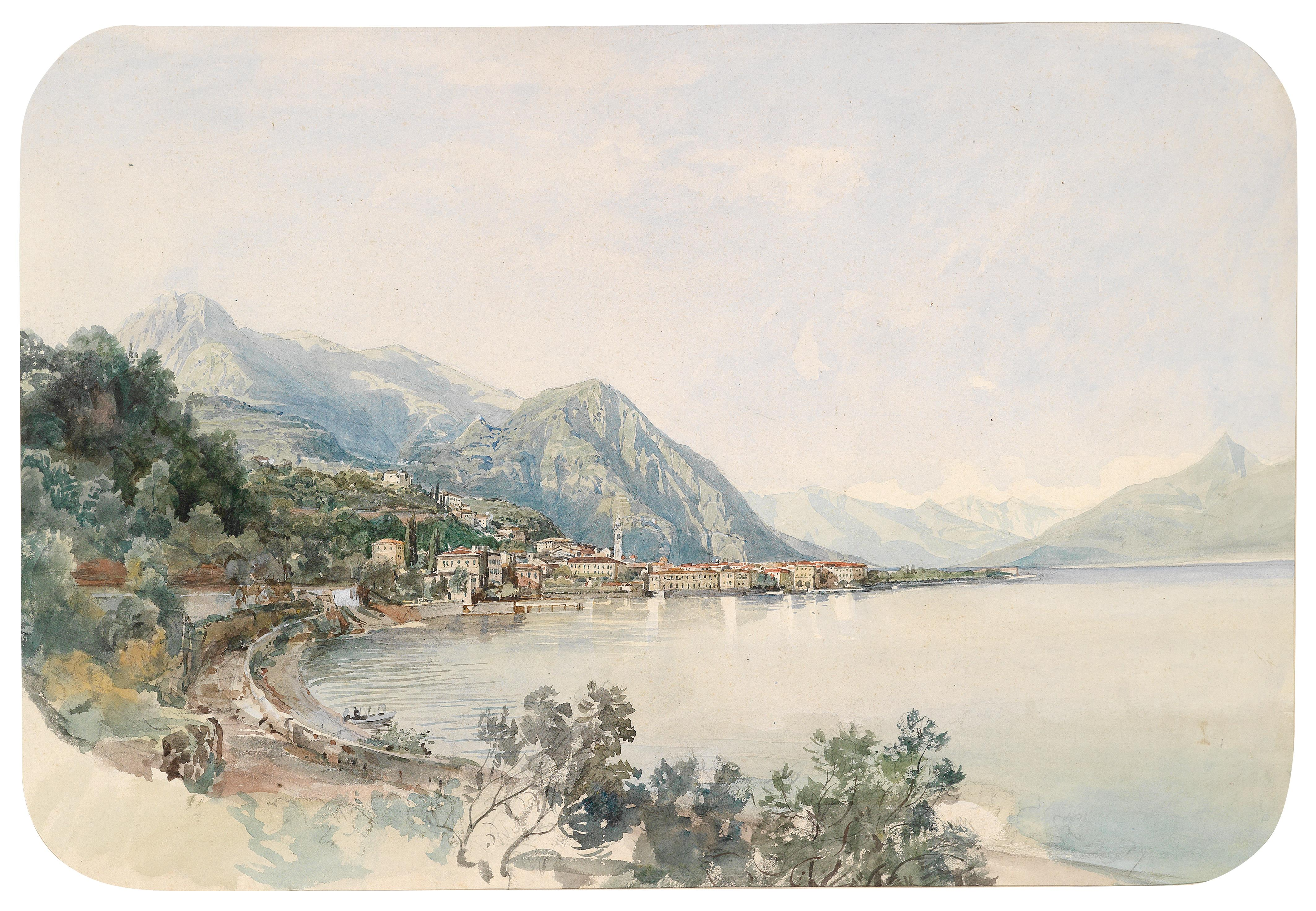 Blick über den Comer See auf Bellaggio